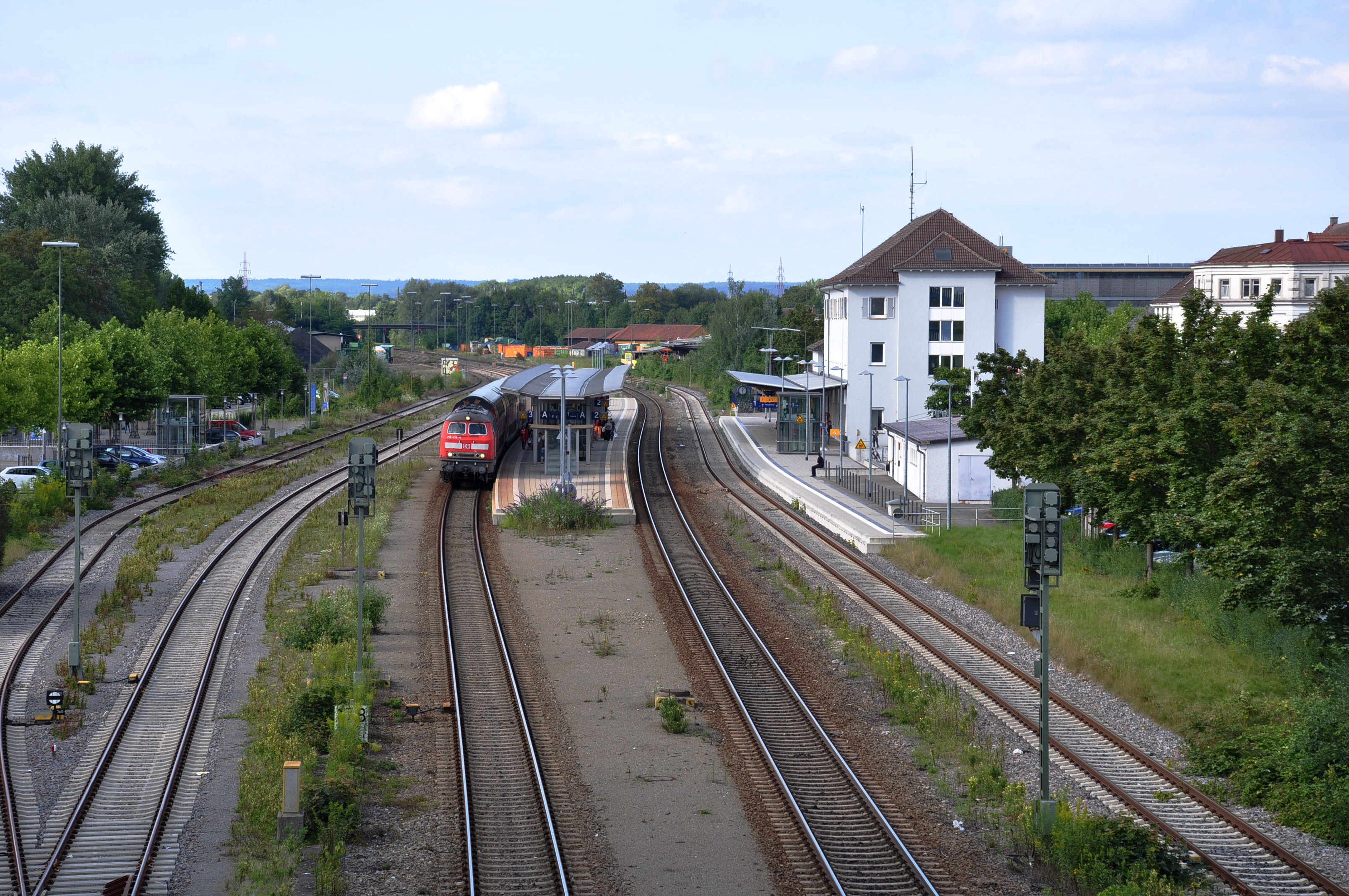 Ravensburg, Bahnhof, gesehen von der Brücke Meersburger Straße